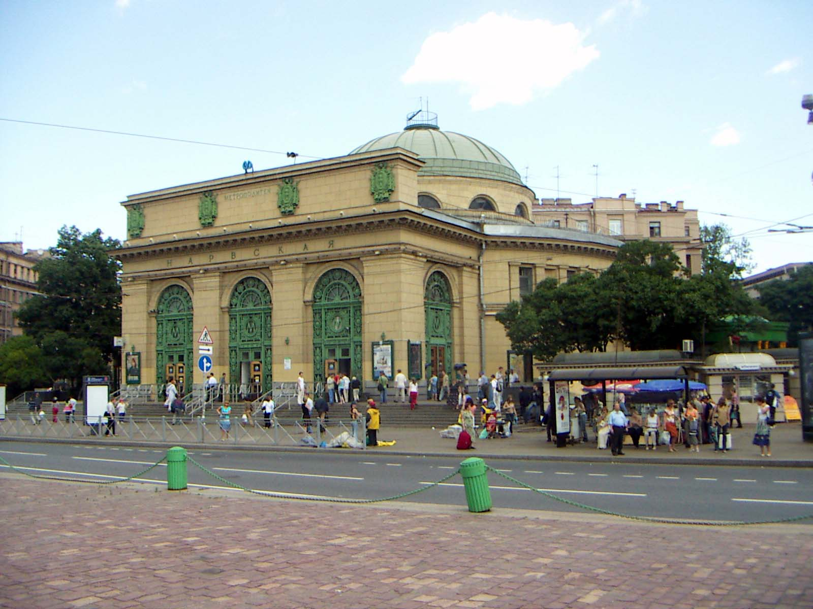 Narvskaya_metrostation in S-Petersburg